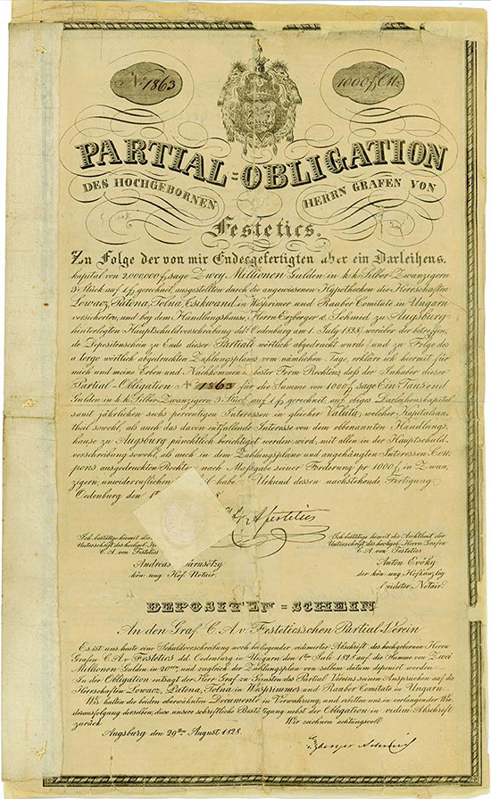 6%ige Partial-Obligation über 1000 Gulden des Graf C[ároly] A[lbert] v. Festetics, Ödenburg, mit Kopie des Depositenscheins des Bankhauses Erzberger & Schmid, Augsburg